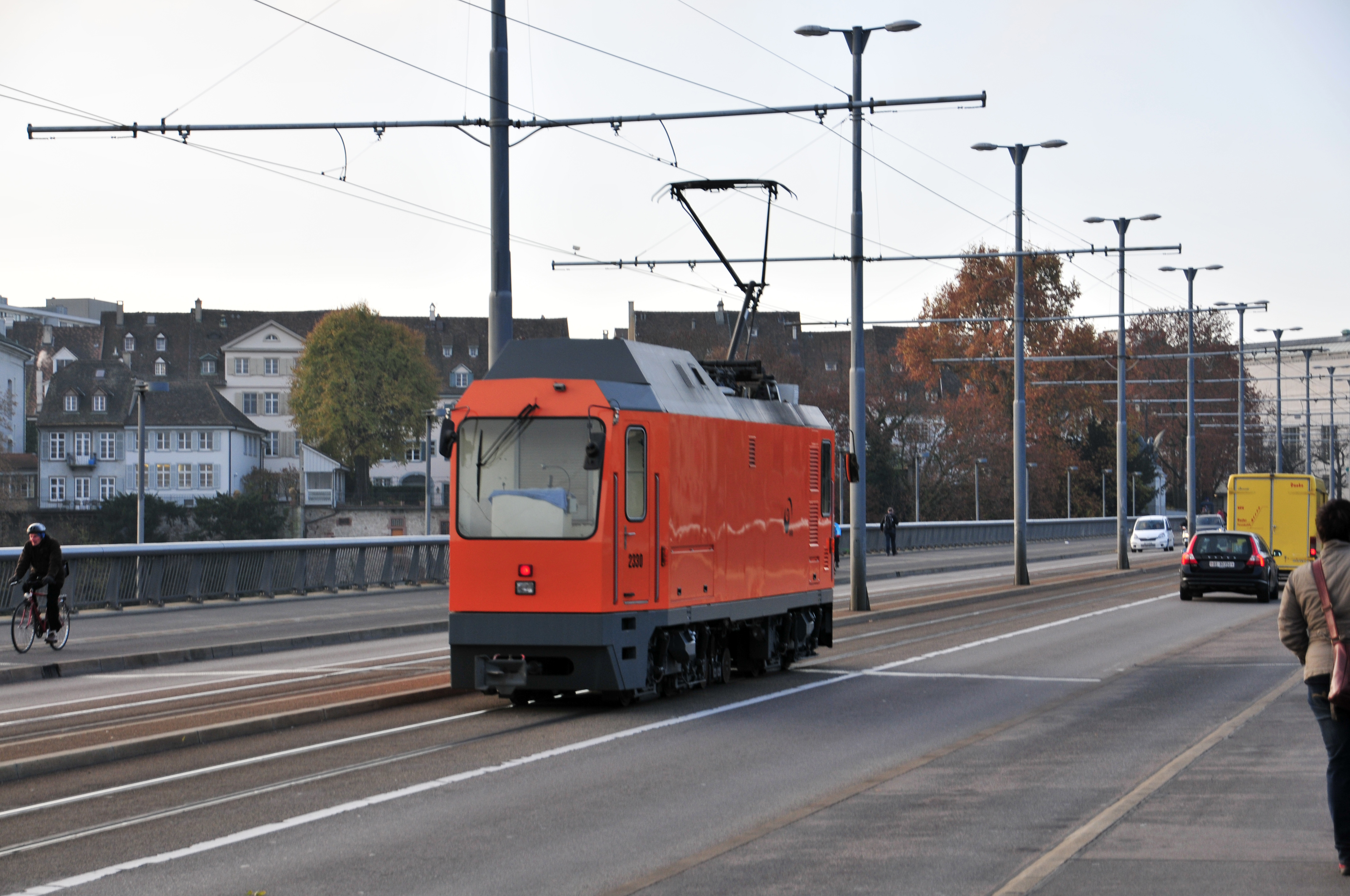 Basel